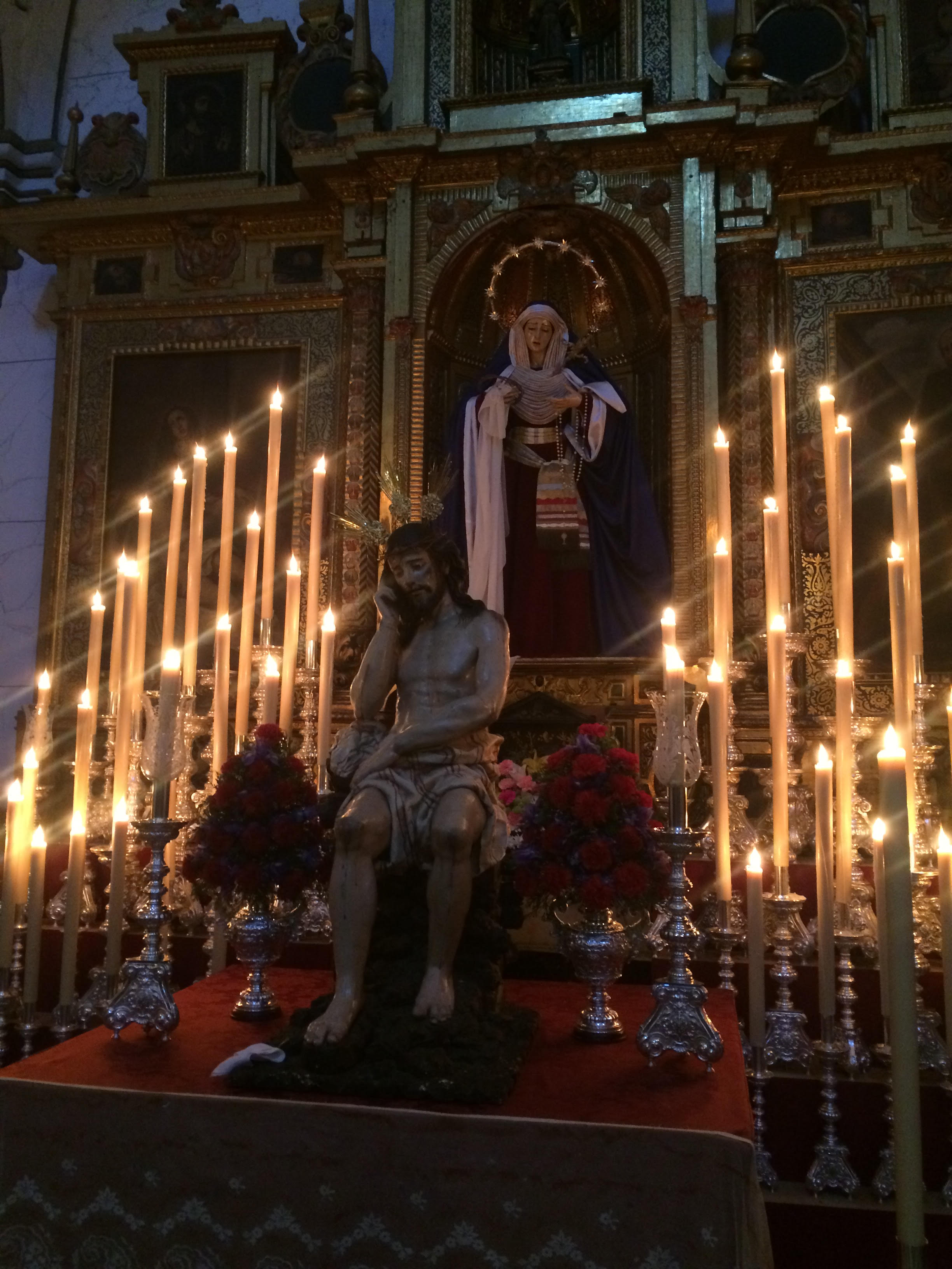 Titulares de la Cofradía de los Estudiantes (Granada)